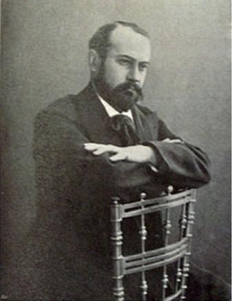 Эдуардс, Борис Васильевич